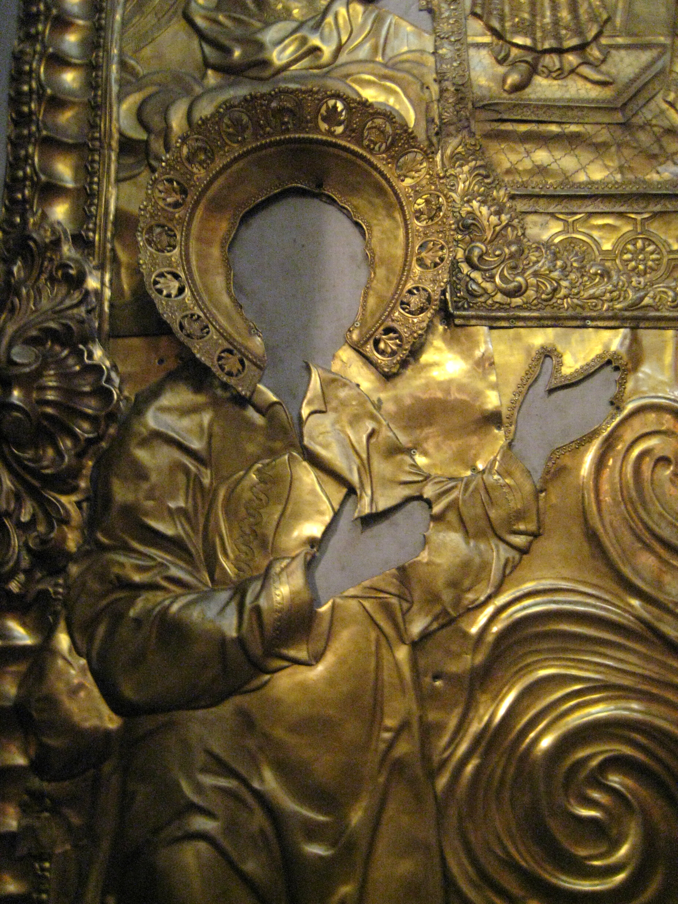 Икона "Покров Пресвятой Богородицы с предстоящими Василием и Иоанном Блаженными". 1780-е. Москва. Монументальная икона (3,5х2,45 м) написна специально для южного фасада Покровского собора. Она имеет уникальный состав сюжетов и святых, связанных с посвящением престолов храма. В верхней части - изображение иконы "Покров Пресвятой Богородицы", которую несут два ангела, с фигурами Андрея Юродивого, императора Льва, императрицы Феофано и патриарха Тарасия. По сторонам - фигуры предстоящих иконе Василия Блаженного и Иоанна Юродивого, святых, похороненных в соборе. В центре - сцена их жития Василия Блаженного "Чудо спасения на море корабля персидских купцов".